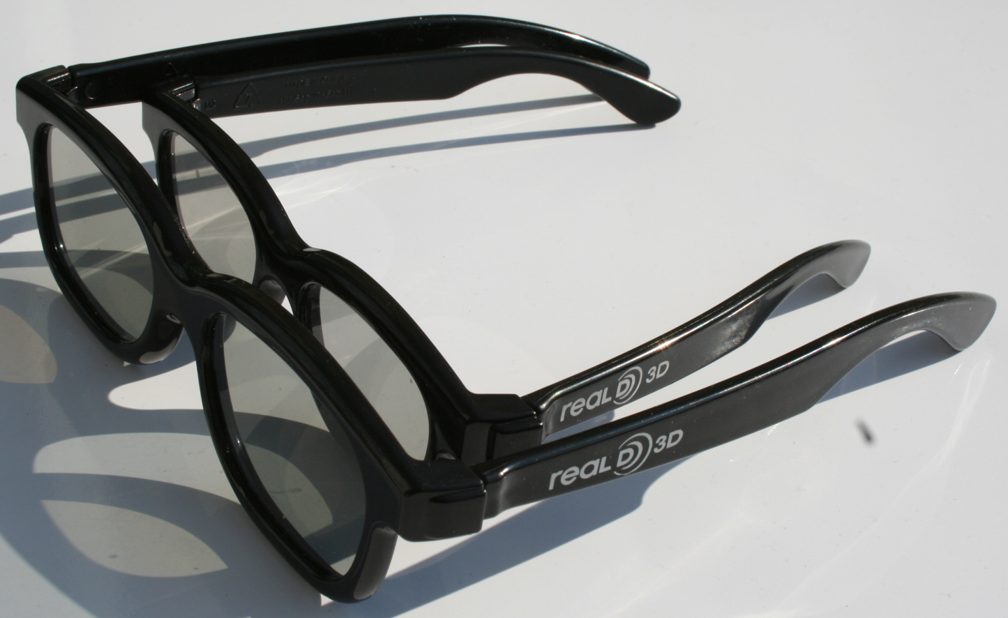 Real D, KInderbrille im Vergleich zur normalen 3D-Brille